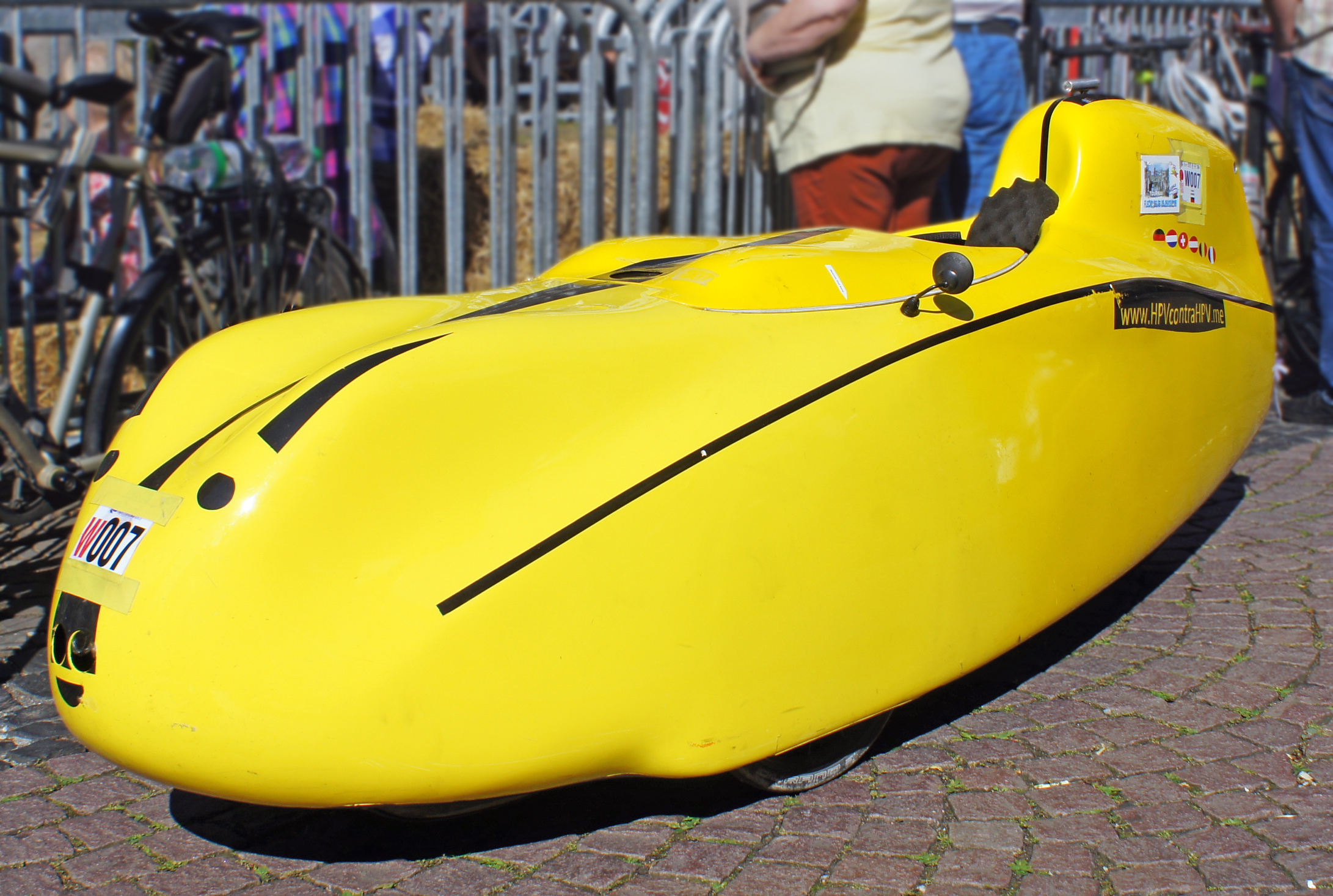 voll verkleidetes Liegerad, Dreirad Aufnahmeort Monschau, Eifel